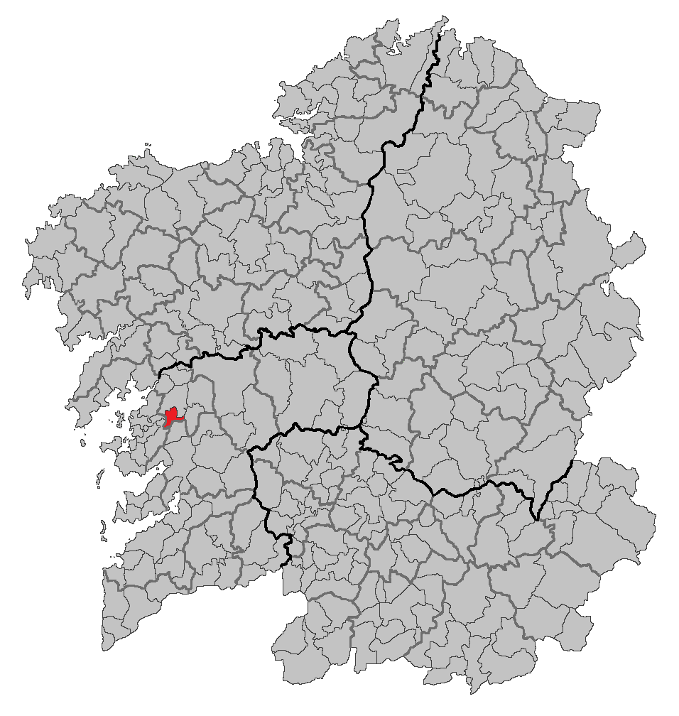 Mapa coa localización do concello de Portas.